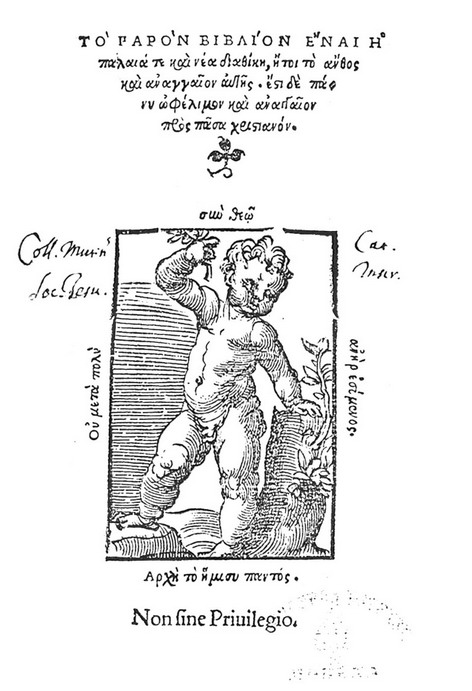 Το εξώφυλλο του βιβλίου Η Παλαια τε και Νέα Διαθήκη, του συγγραφέα Ιοαννίκιου Καρτάνου. Ο αρχικός πλήρης τίτλος είναι: ΤῸ ΠΑΡῸΝ ΒΙΒΛΊΟΝ ΕἼΝΑΙ Ἤ παλαιά τε καὶ νέα διαθίκη, ἤτοι τὸ ἄνθος καὶ ἀναγγαῖον ἀυτῆς. ἔσι δὲ πάς ιν ὠφέλιμον καὶ ἀναγγαῖον πρὸς πᾶσα χριστιανόν. Τοποθεσία: Εκδόθηκε στην Βενετία, Ιταλία Άλλες πληροφορίες Εκδότης: Bartholomaei Zanetti Πρωτότυπες πληροφορίες έκδοσης: Venetiis : in aedibus Bartholomaei Zanetti Casterzagensis, 1536 mense Nouembri Τρέχουσα τοποθεσία: MO0089 Biblioteca Estense Universitaria - Modena Βιβλιογραφικός αριθμός αναγνώρισης: CNCE 53086